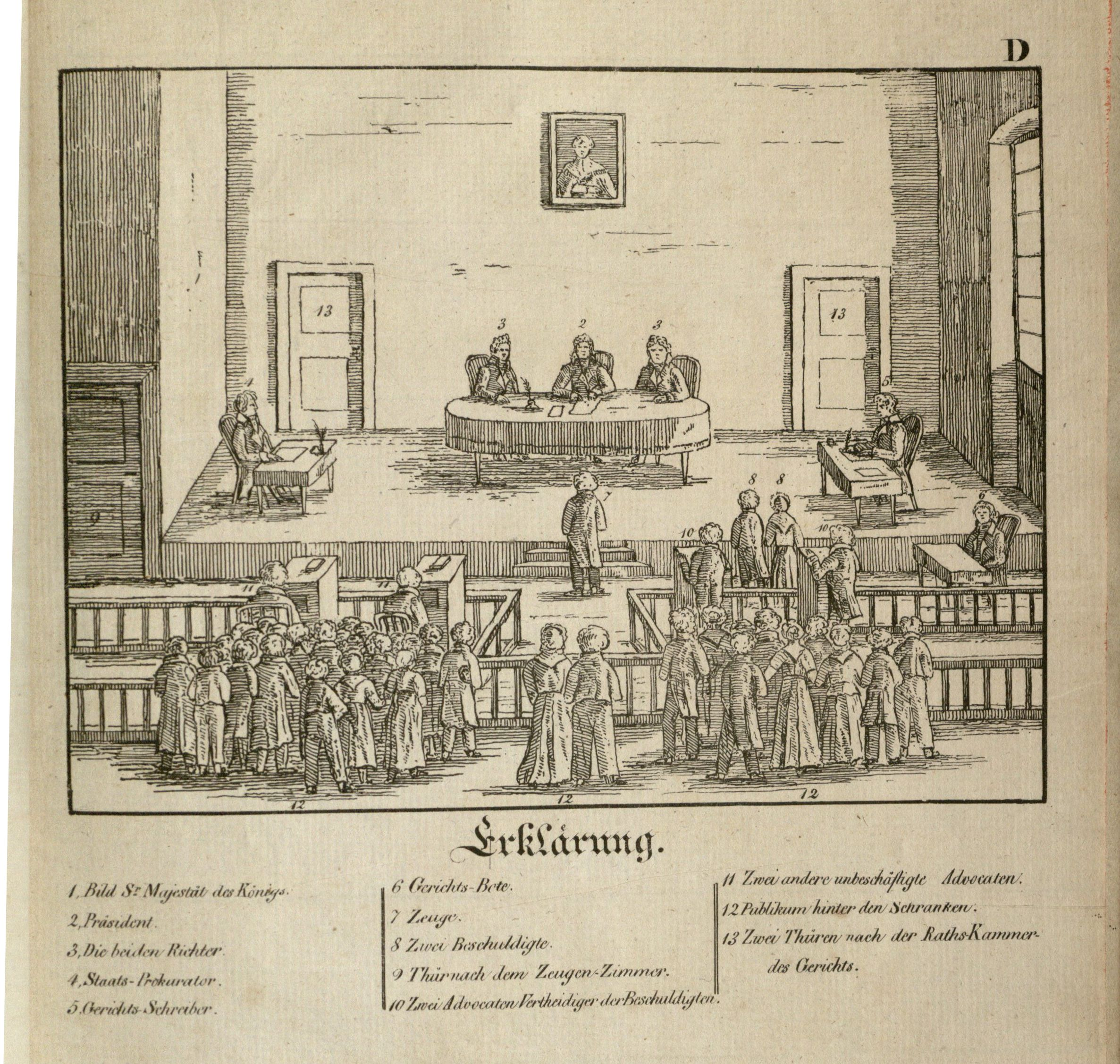 Plate D: "Eine heutige öffentliche Gerichtssitzung des Königl. Bezirksgerichtes in Frankenthal."